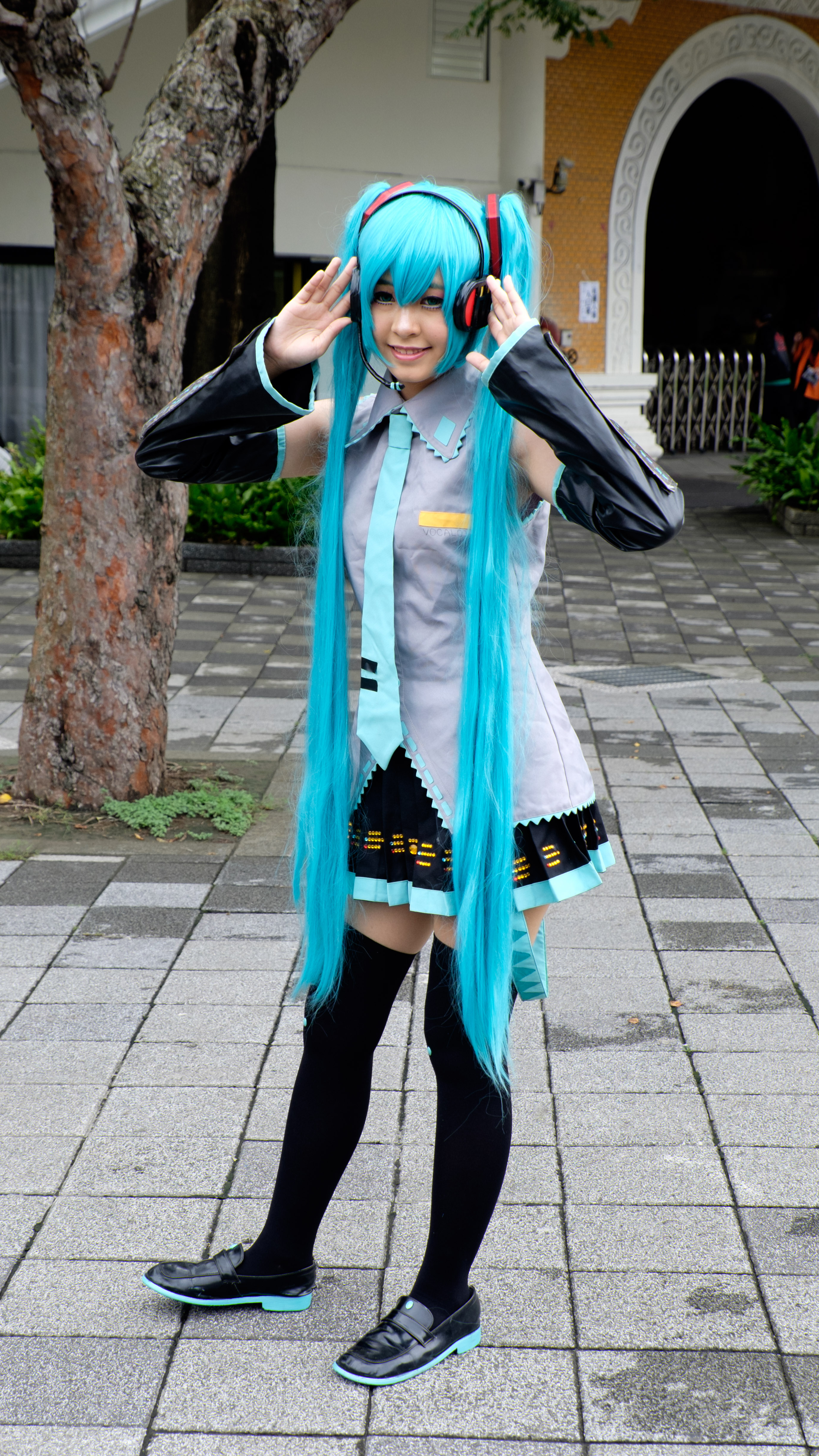 Fancy Frontier 26第一日上午花博競艷館外，初音ミクcosplayer，是日第一位攝影的cosplayer。